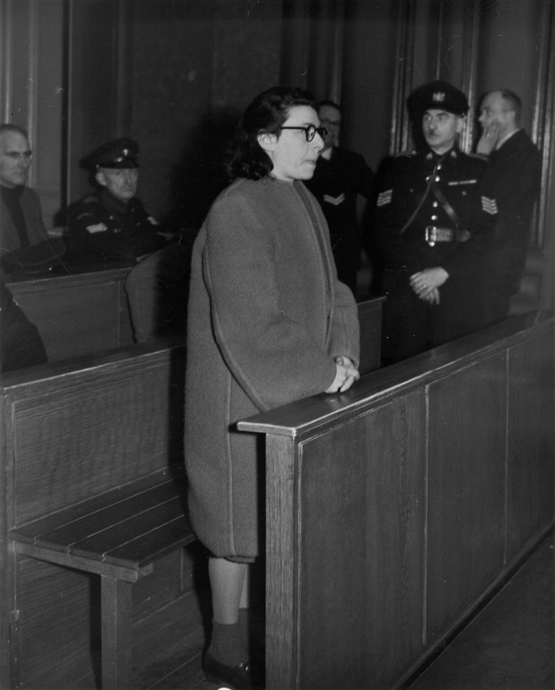 Anna (Ans) van Dijk voor het Bijzonder Gerechtshof in het gebouw van de Nederlandse Handelmaatschappij aan de Vijzelstraat, Amsterdam, 24 februari 1947 Foto Ben van Meerendonk / AHF, collectie IISG, Amsterdam Foto gepubliceerd in De Waarheid, 24 februari 1947, pagina 2